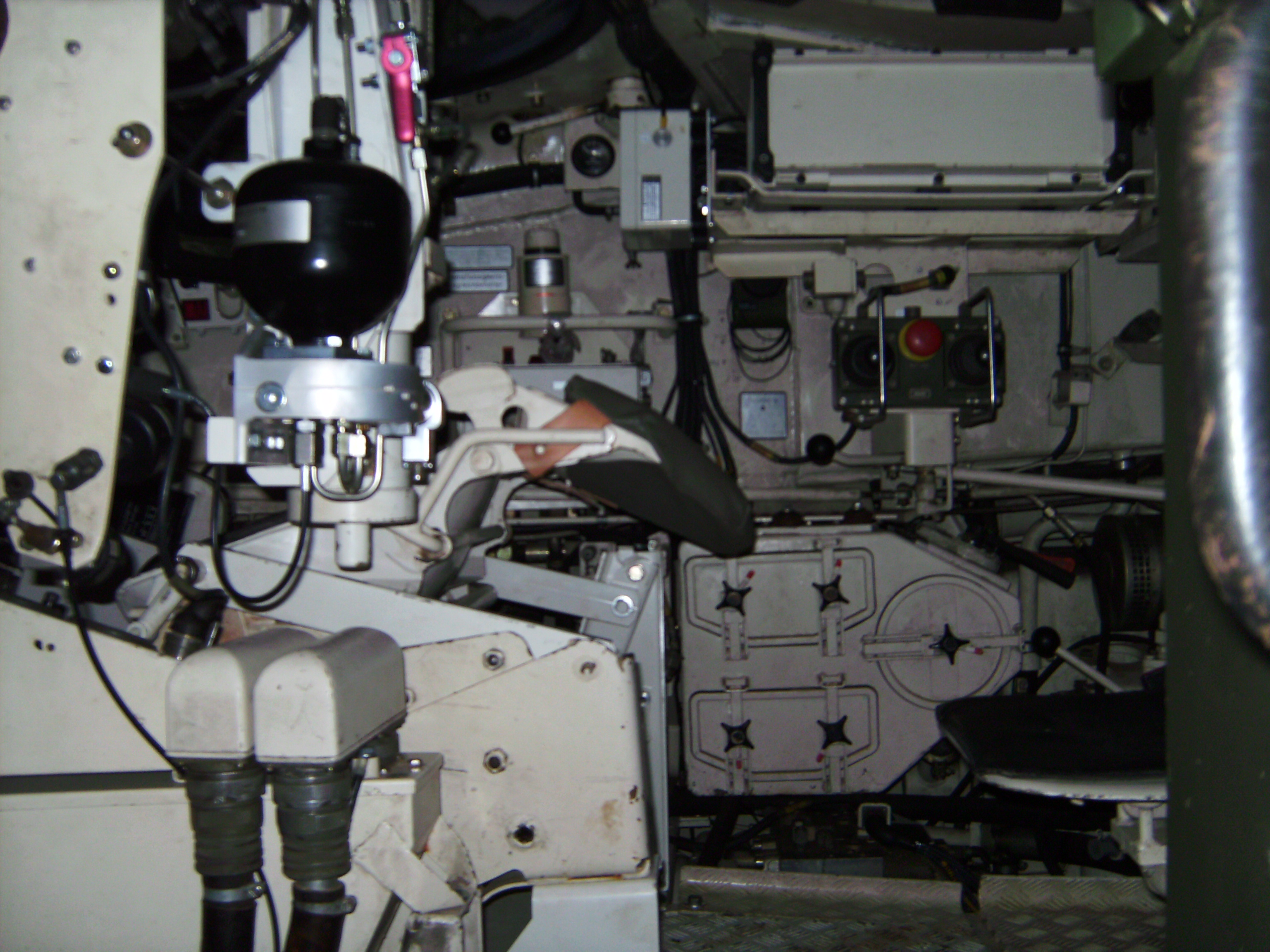 PiPz Dachs Innenraum